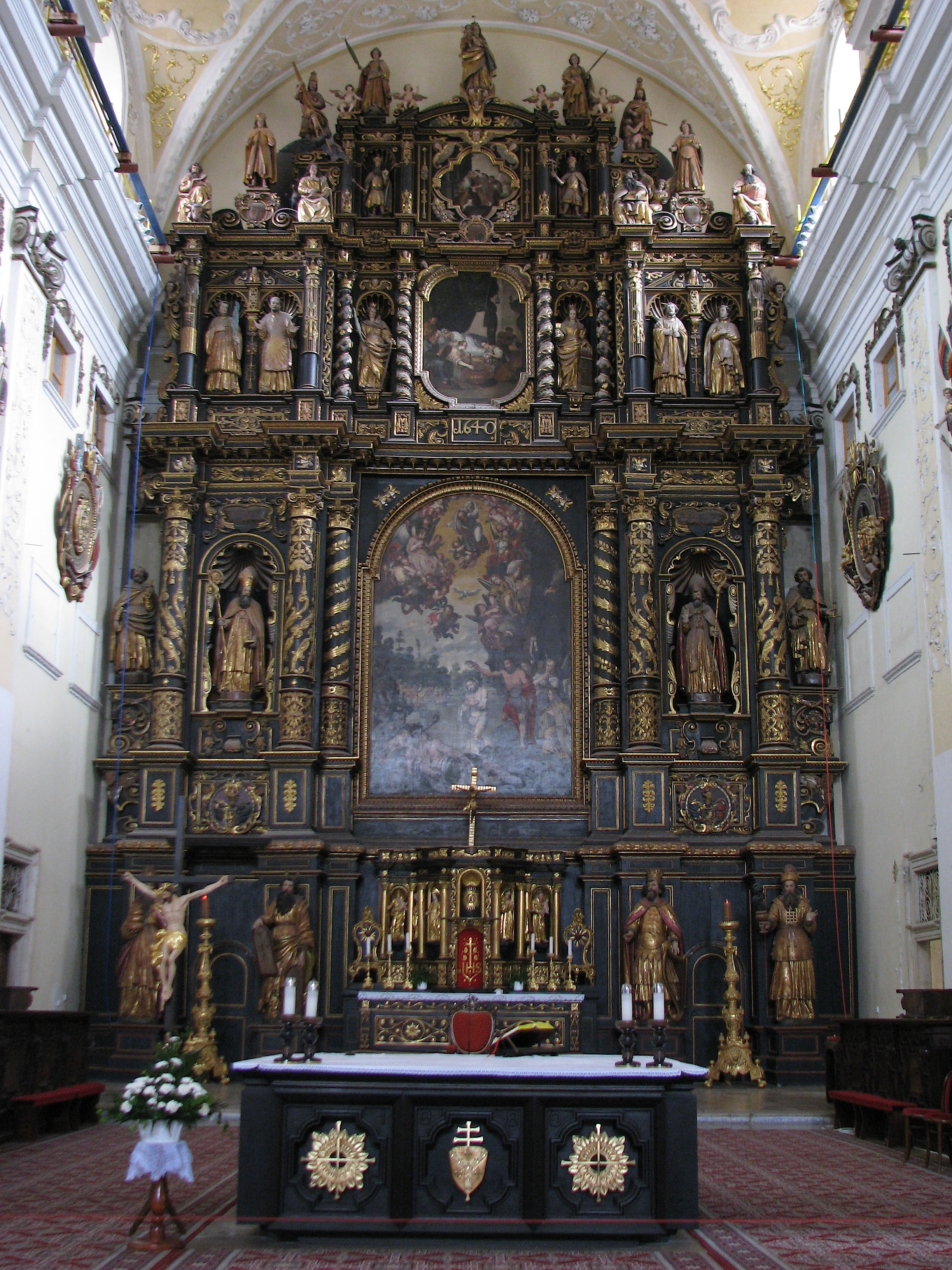 Altarretabel der Universitätskirche in Tyrnau